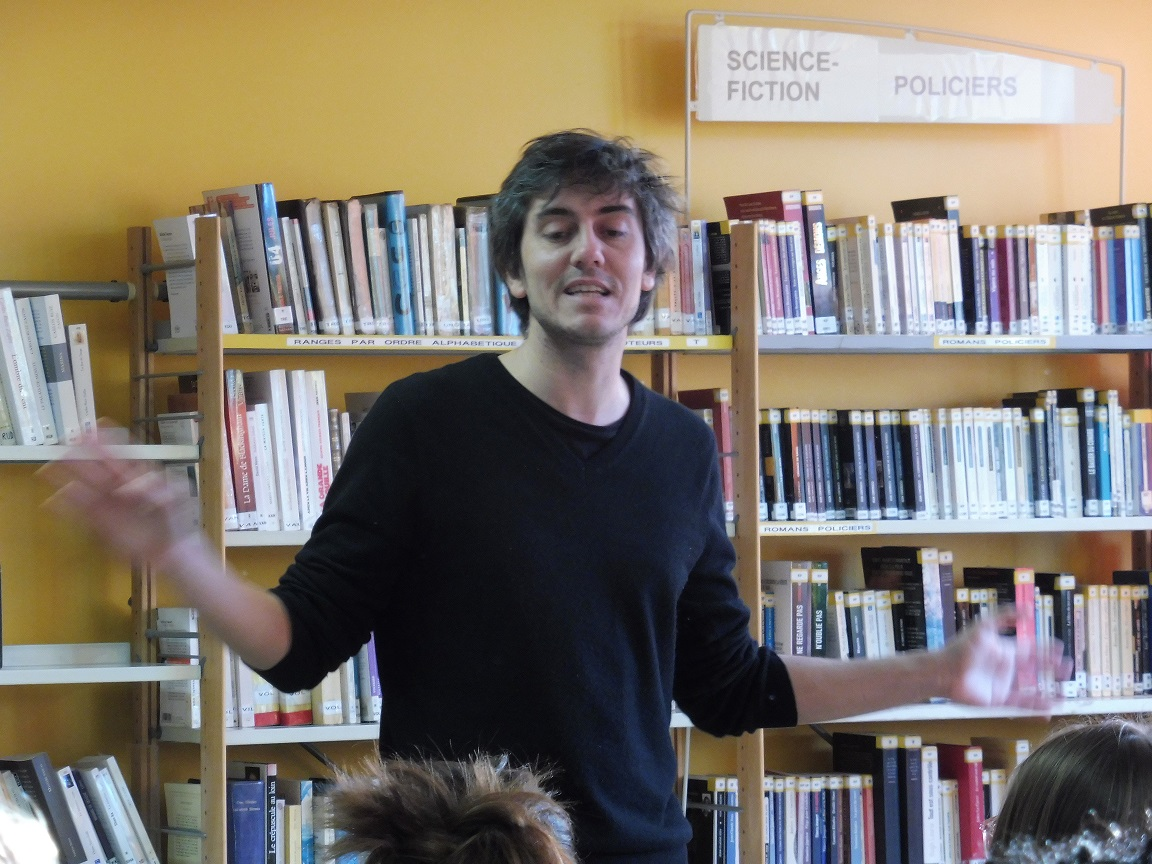 Sylvain Prudhomme aux journées du livre du lycée Langevin de Martigues en janvier 2018